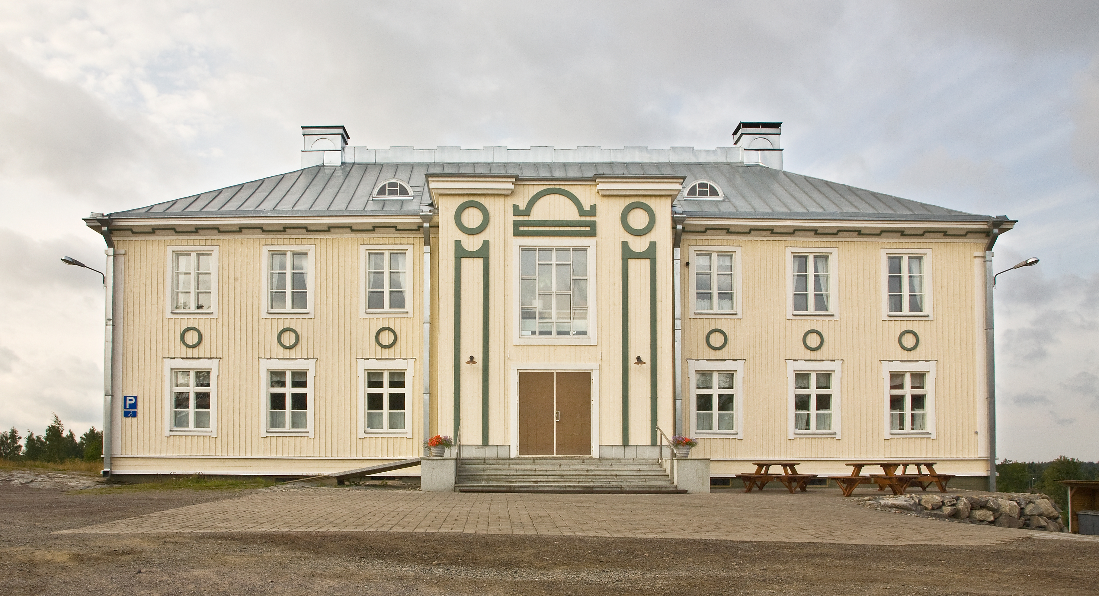 Kokemäen seuratalon julkisivu remontoituna viimeisen palon jälkeen.